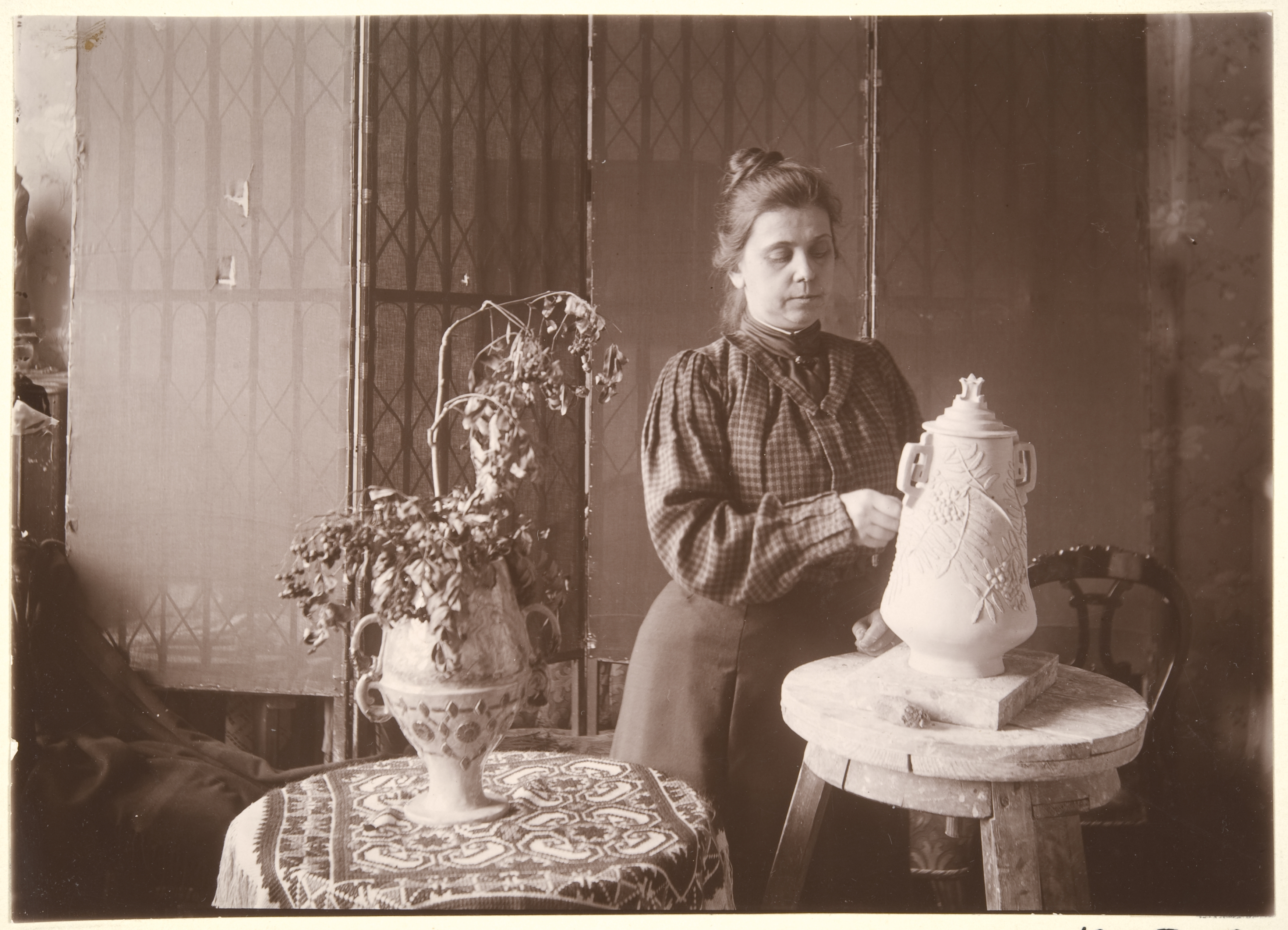 kuvanveistäjä Sigrid af Forselles työstää uurnaa; kuvanveistäjä Sigrid af Forselles työstää uurnaa, af Forselles asui vuosisadan vaihteessa Helsingissä, jossa muovaili savesta reliefein ja uurtokuvioin koristeltuja vaaseja ja uurnia.